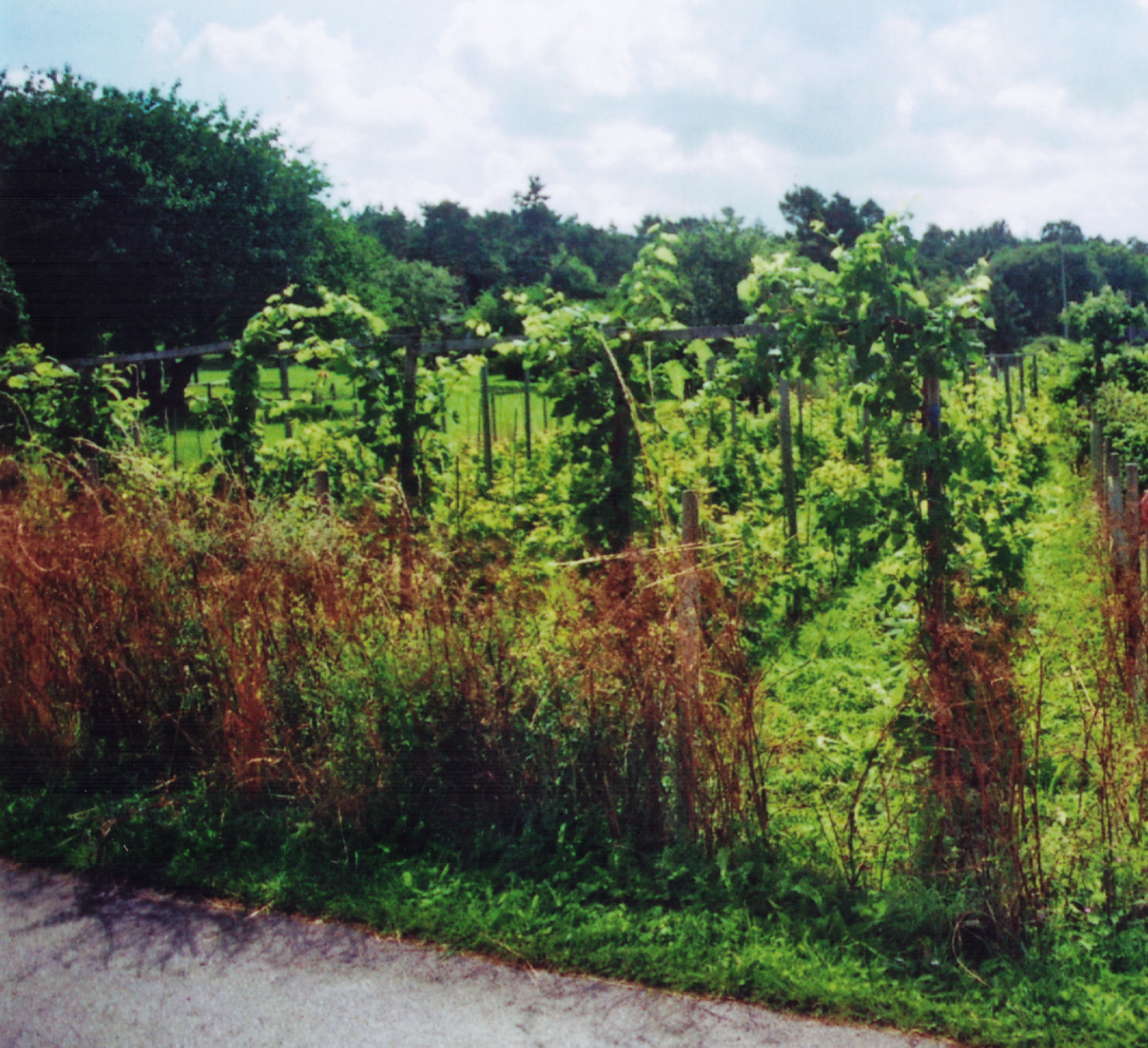 Weinbau in Hallshuk, Gotland